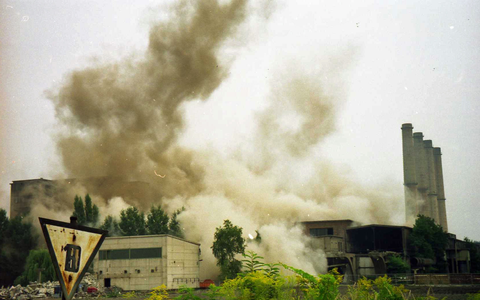 Kraftwerk Trattendorf: Nach der Sprengung der Schornsteine Werk III